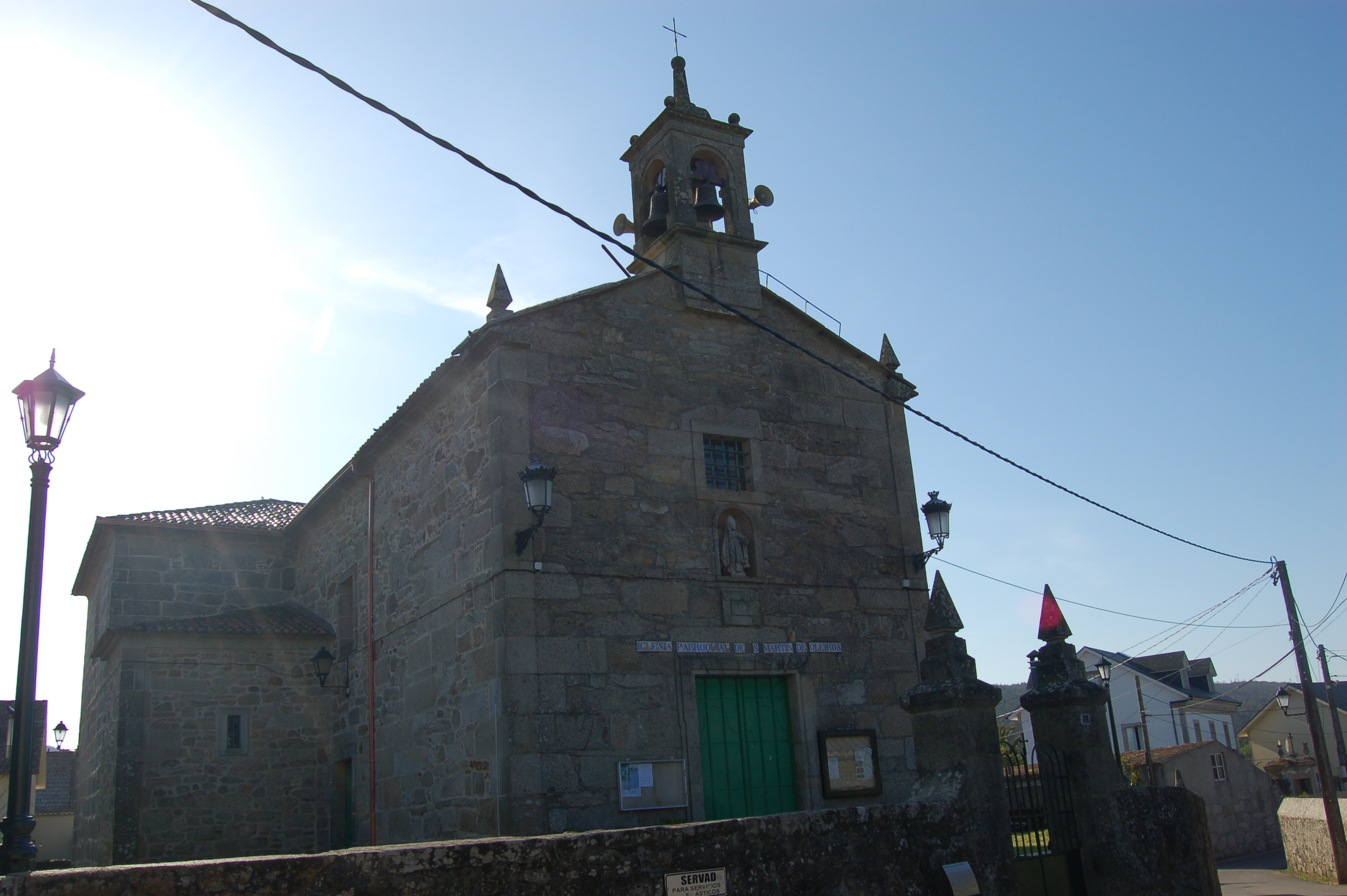 Igrexa parroquial de San Martiño de Oleiros (Ribeira).